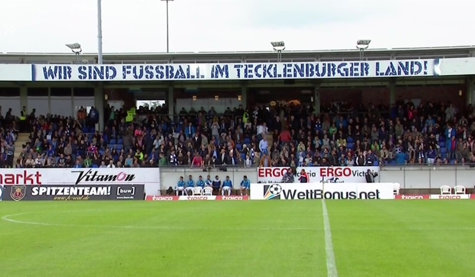 Haupttribüne des Sportpark am Lotter Kreuz